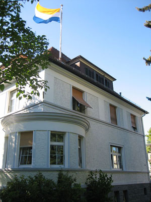 Verbindungshaus des Corps Normannia Halle in Gießen